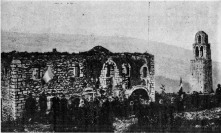 Κατεστραμμένη Μονή Αγίων Σαράντα, 1913